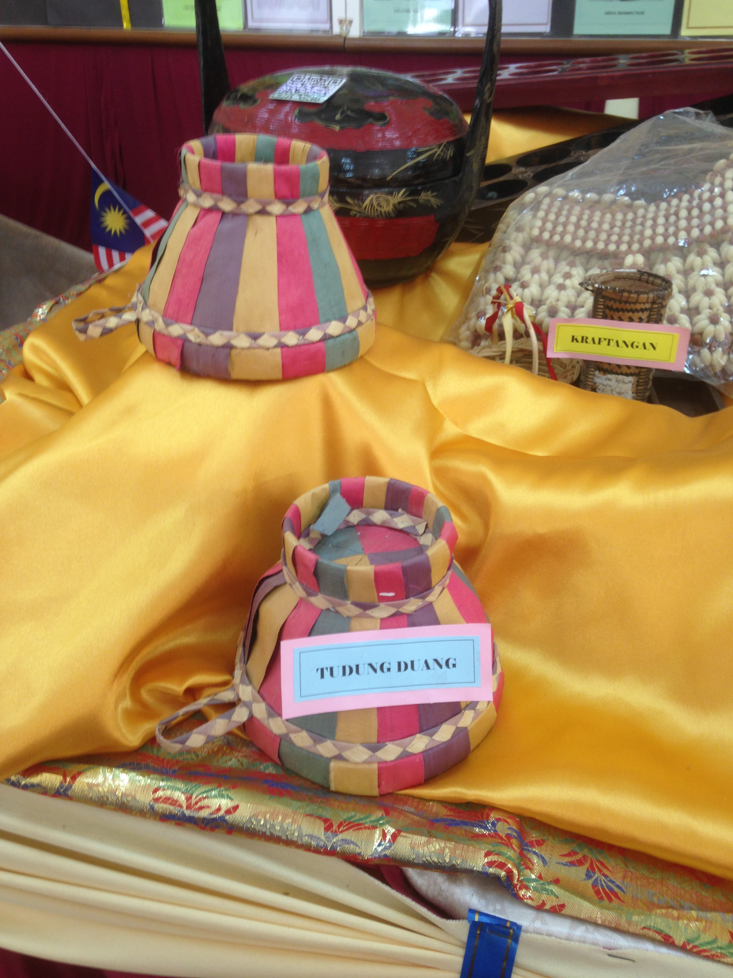 TUDUNG DUANG